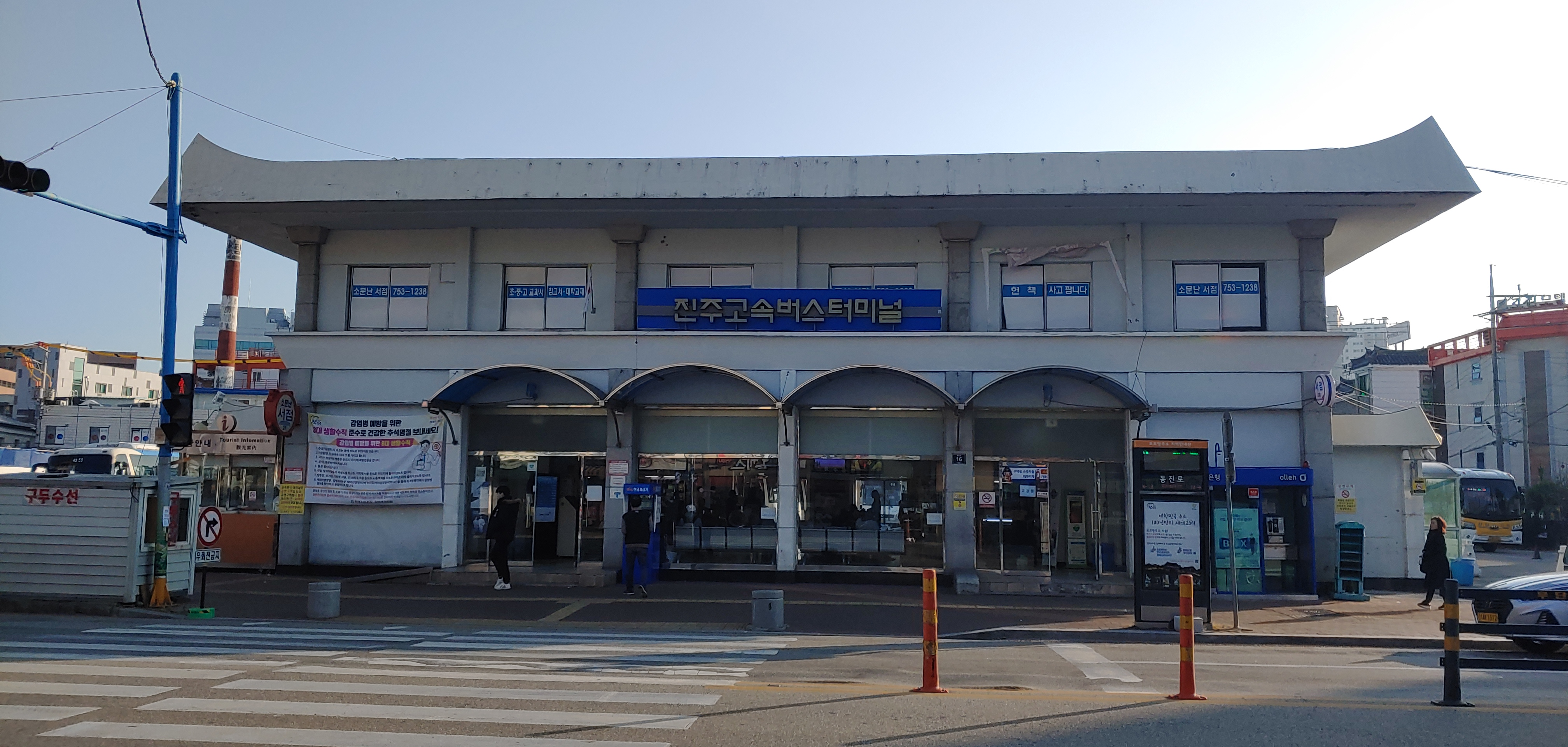 진주 고속버스 터미널 정면